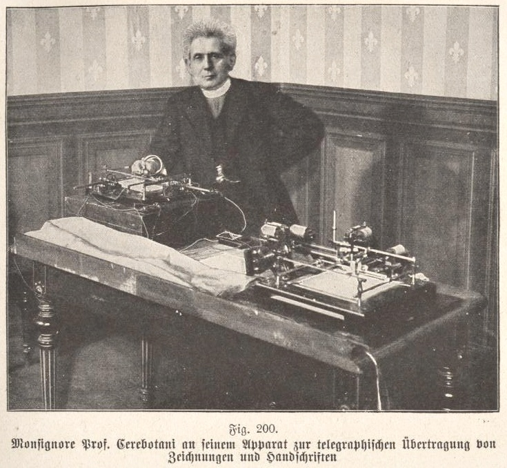 Luigi Cerebotani (1847-1928) italienischer Priester und Physiker